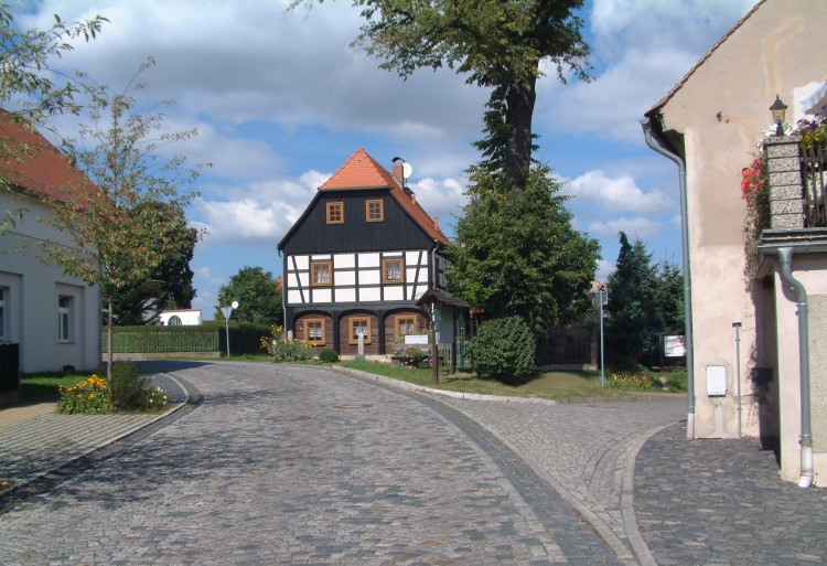 Dorfstraße 15, Hartau, Saxony, Germany